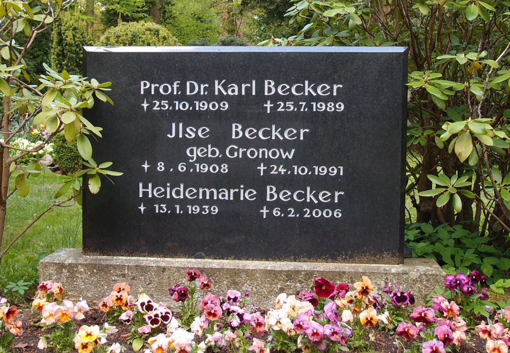 Grab des Wirtschaftswissenschaftlers und Politikers Karl Becker (1909-1989) auf dem Südfriedhof in Kiel.